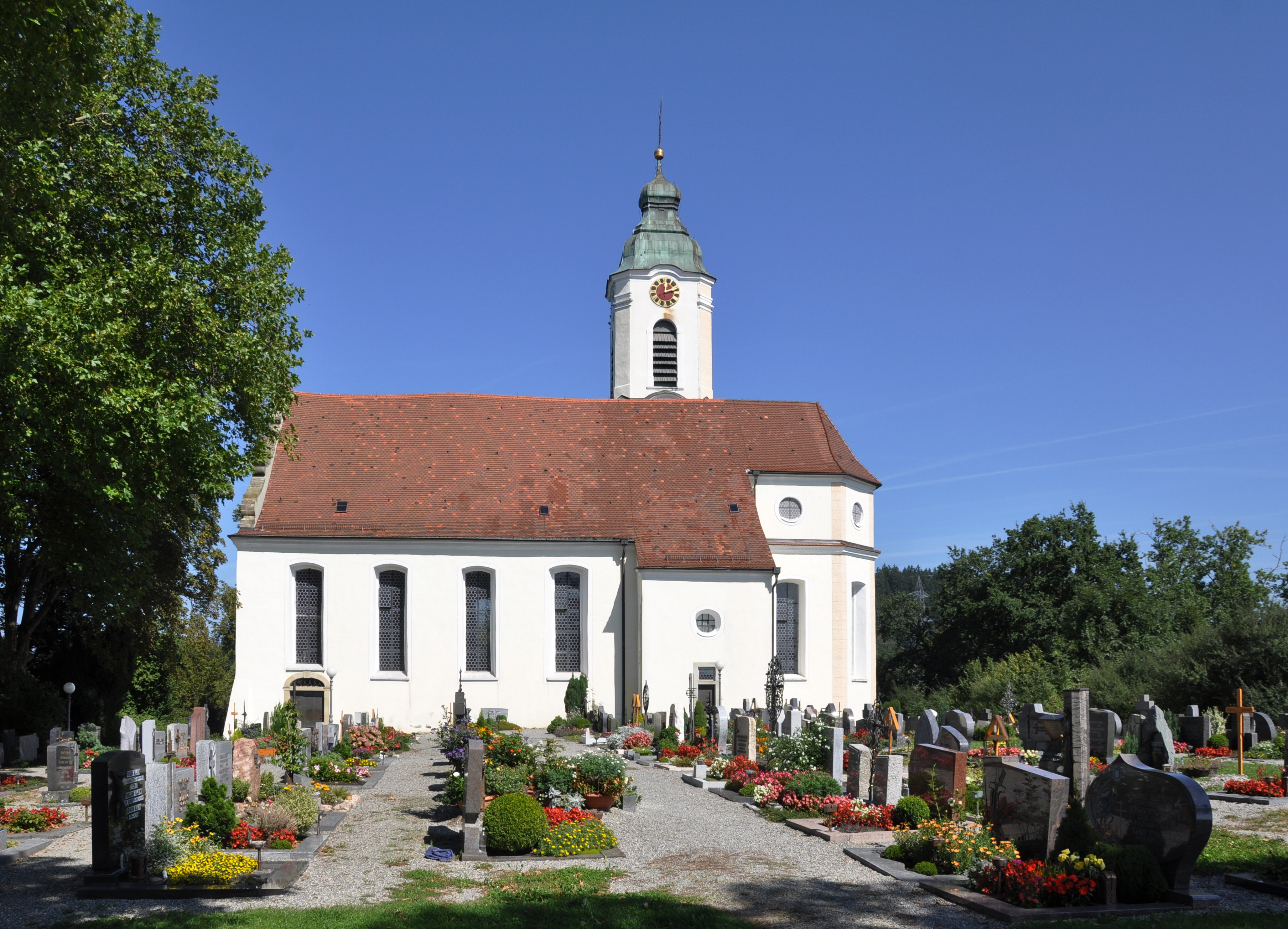 Bodnegg, Katholische Pfarrkirche St. Ulrich und Magnus, Außenansicht vom Friedhof